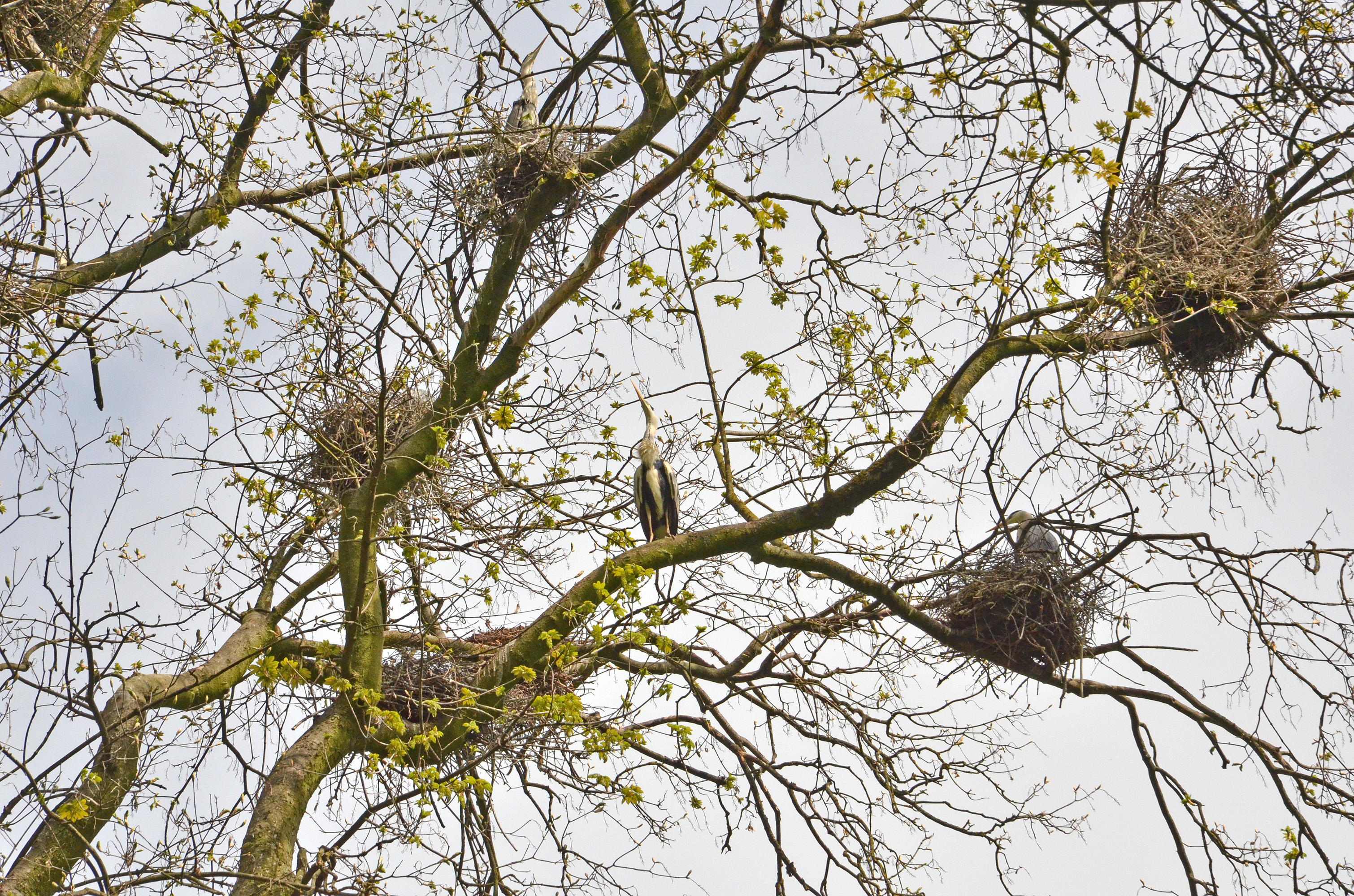 «Сокілецька колонія чапель» — зоологічна пам'ятка природи місцевого значення у виділах 20, 21, 27 кварталу 71 Язловецького лісництва ДП «Бучацьке лісове господарство» в межах лісового урочища «Язловець» поблизу с.Сокілець Бучацького району Тернопільської області. Гнізда чапель на дереві.